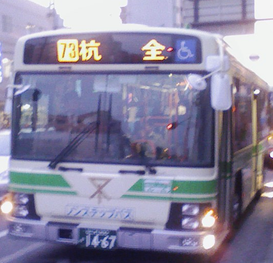 73号系統杭全行。2010年3月30日18時13分大池橋バス停付近にて撮影。